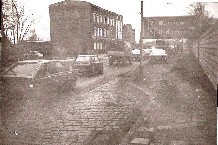 ul. Piątkowska (wtedy Obornicka), Poznań, styczeń 1990r.